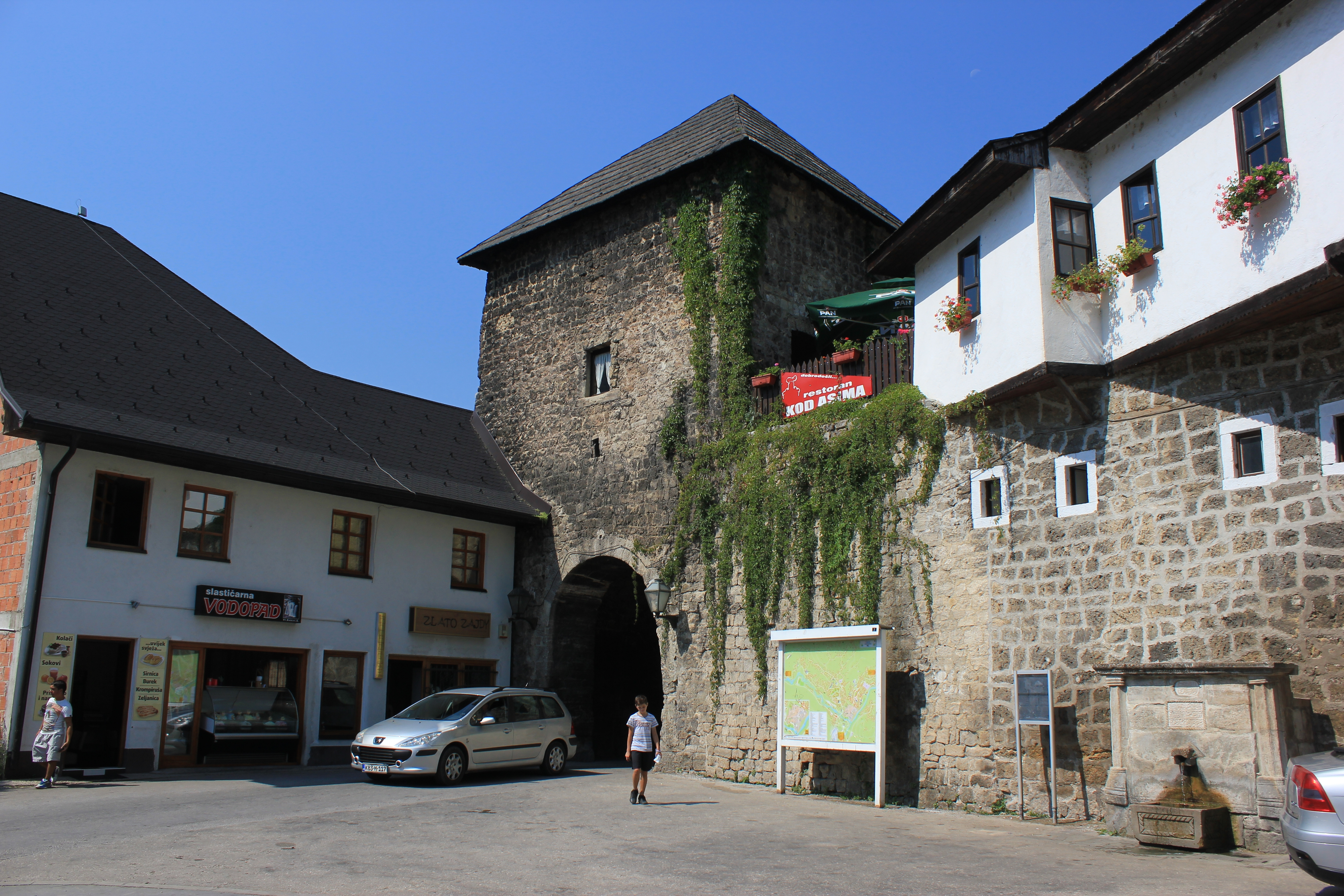 Das Travniker Tor in der Altstadt von Jajce